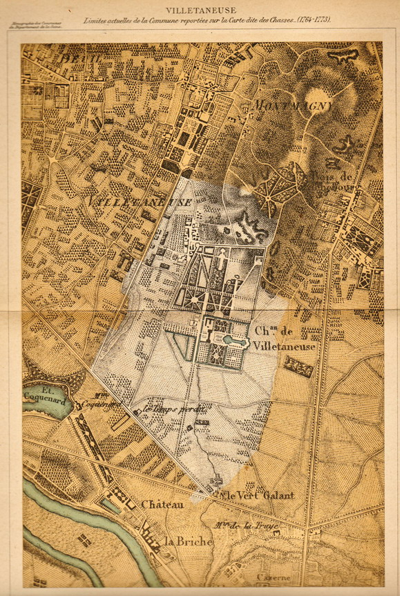 Villetaneuse Carte des Chasses, reproduite dans la monographie sur Villetaneuse de l'Etat des communes de la Seine à la fin du XIXe siècle (Montévrain, 1896)